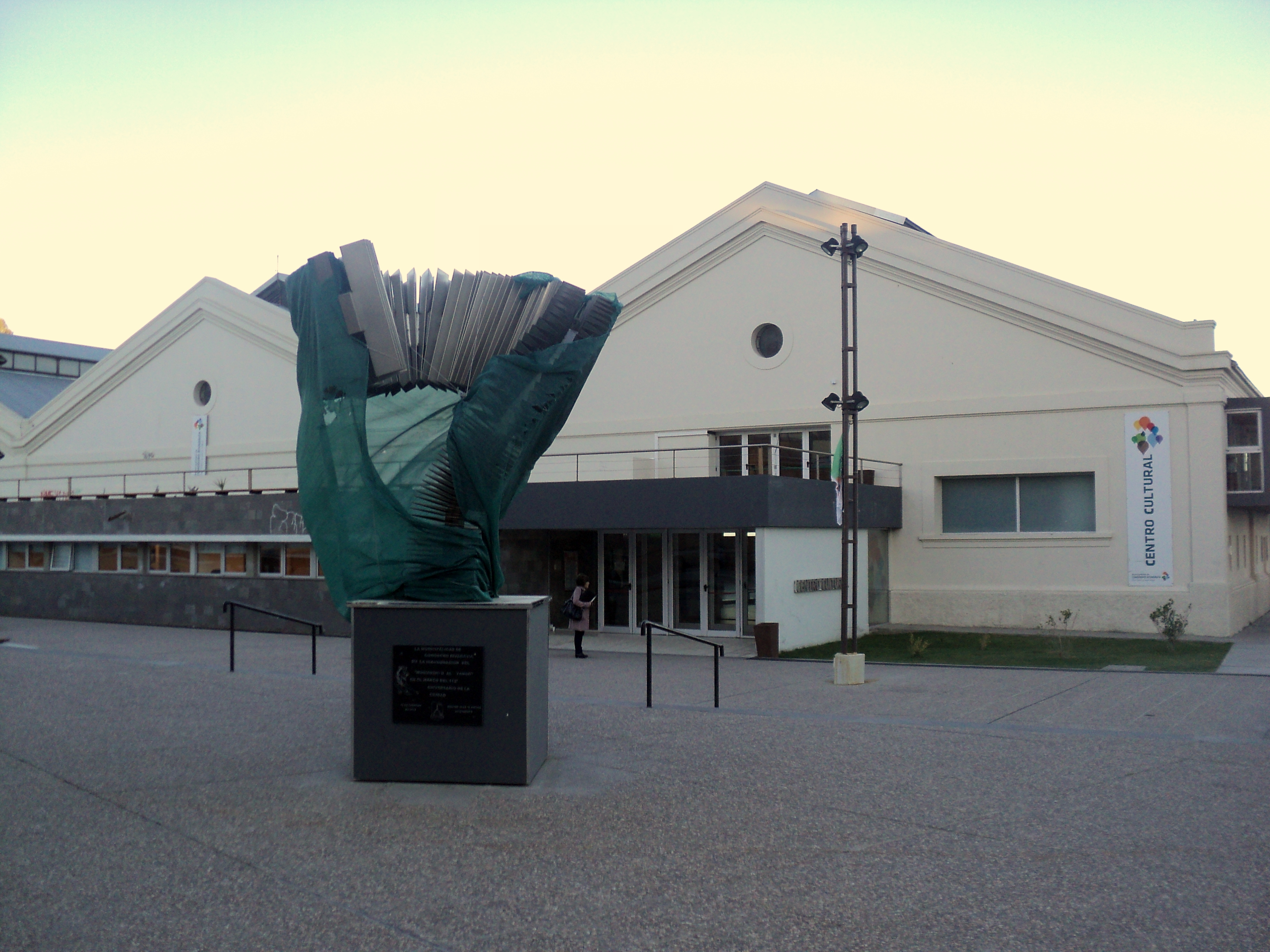 Monumento al Tango en el centro cultural de Comodoro Rivadavia